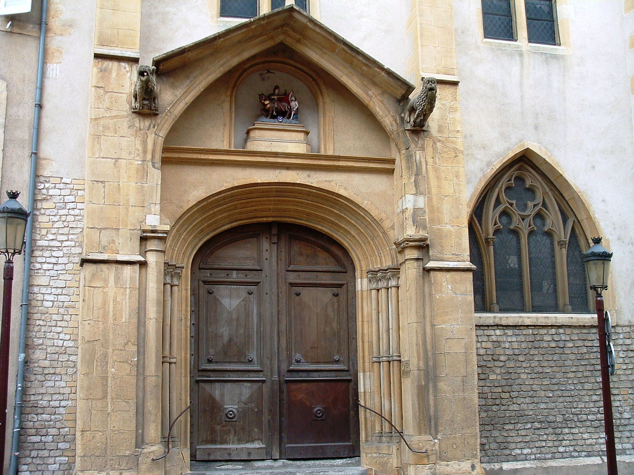 Metz - Eglise Saint-Martin - Reste de l'enceinte gallo-romaine dans le mur de l'église de part et d'autre du portail